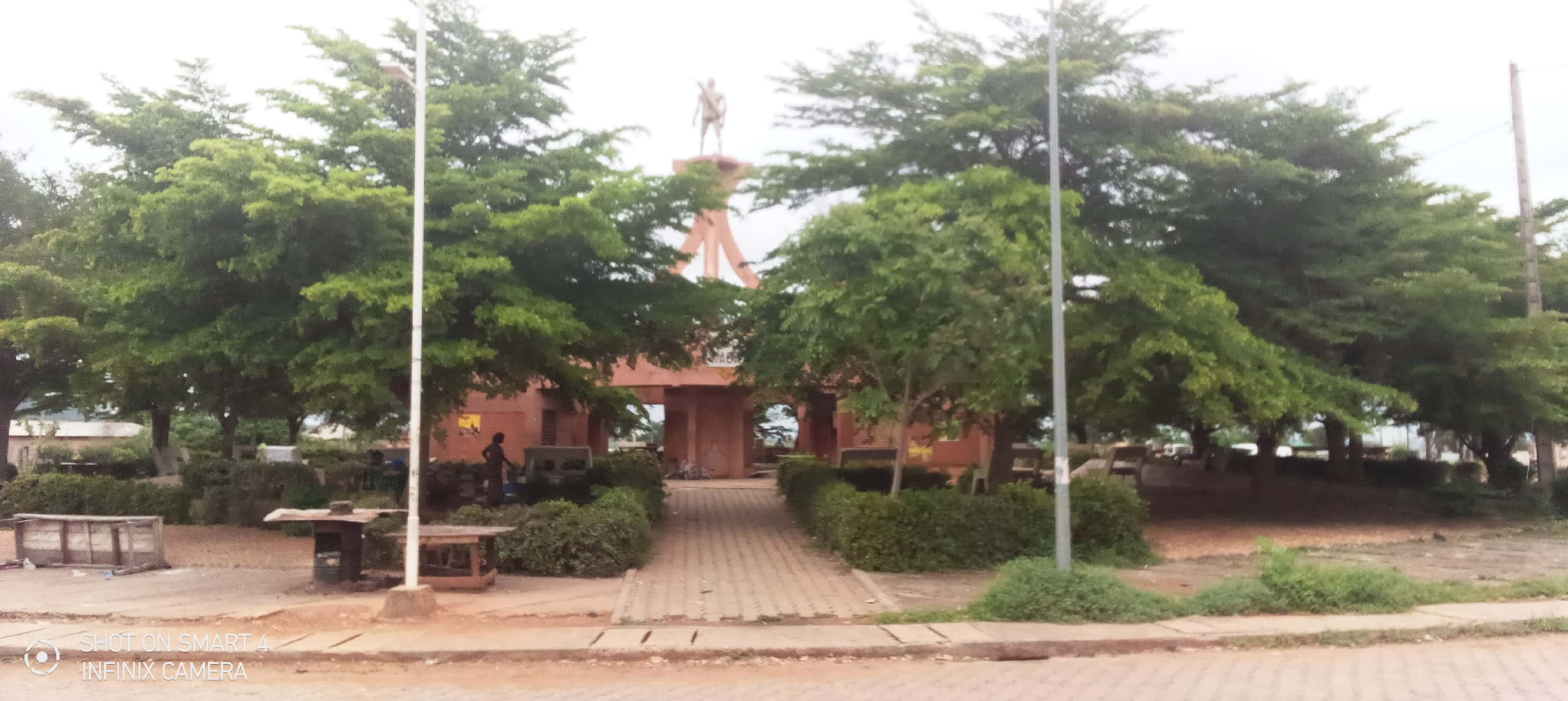 Mussé Kaba est situé vers la sortie Natitingou,guerié de la résidence africaine